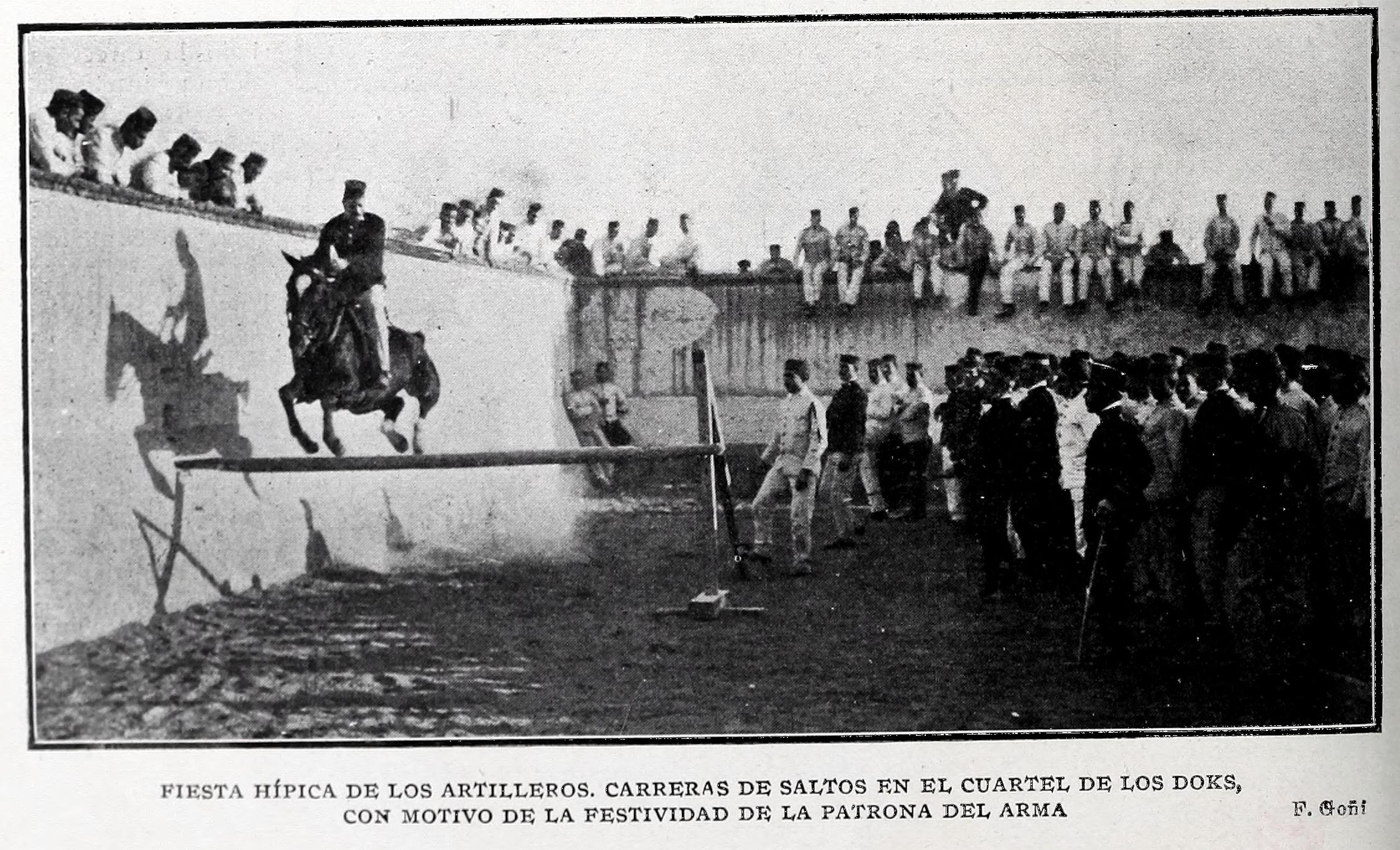 La patrona de los artilleros.